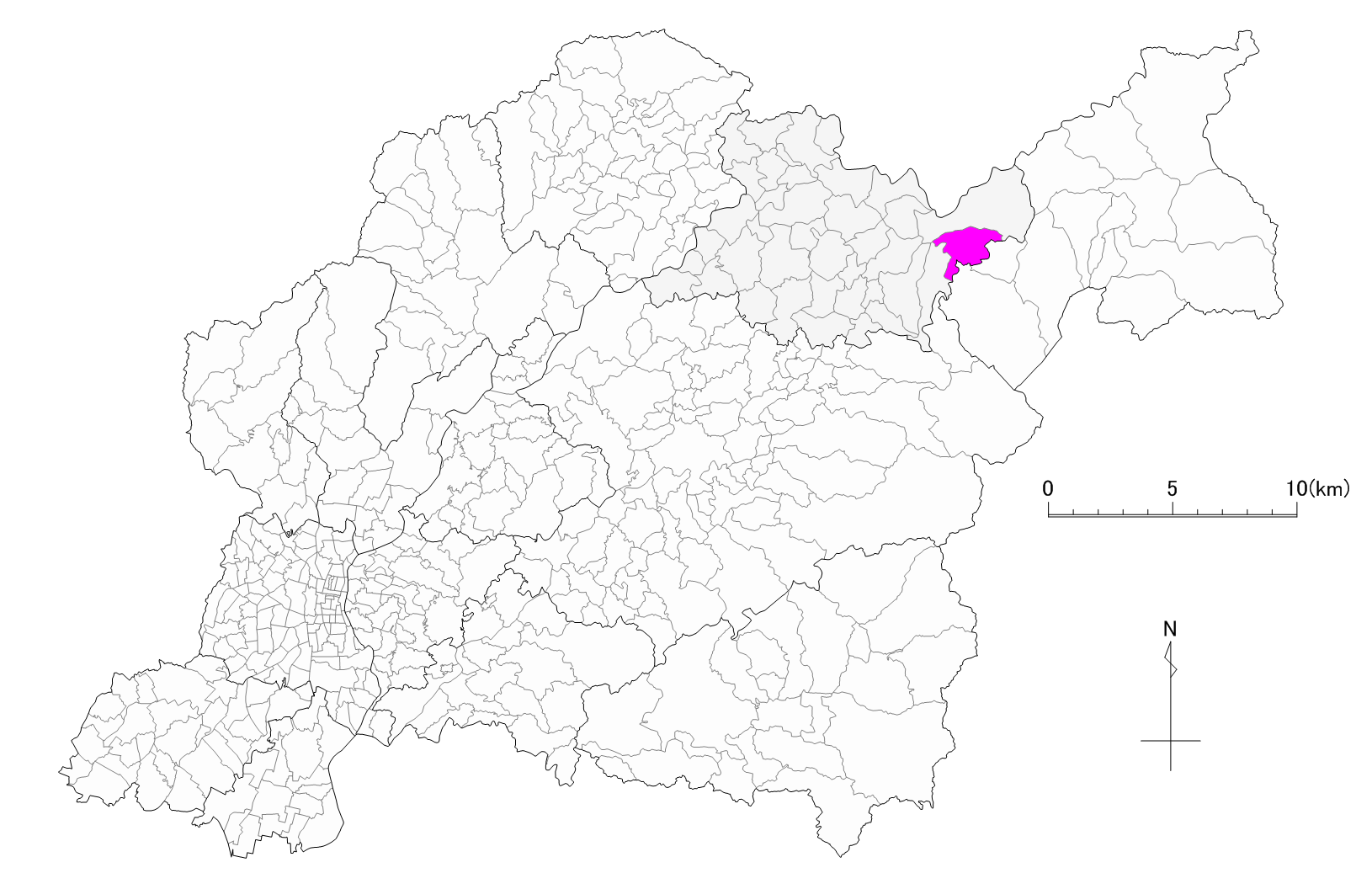 豊田市田津原町位置図